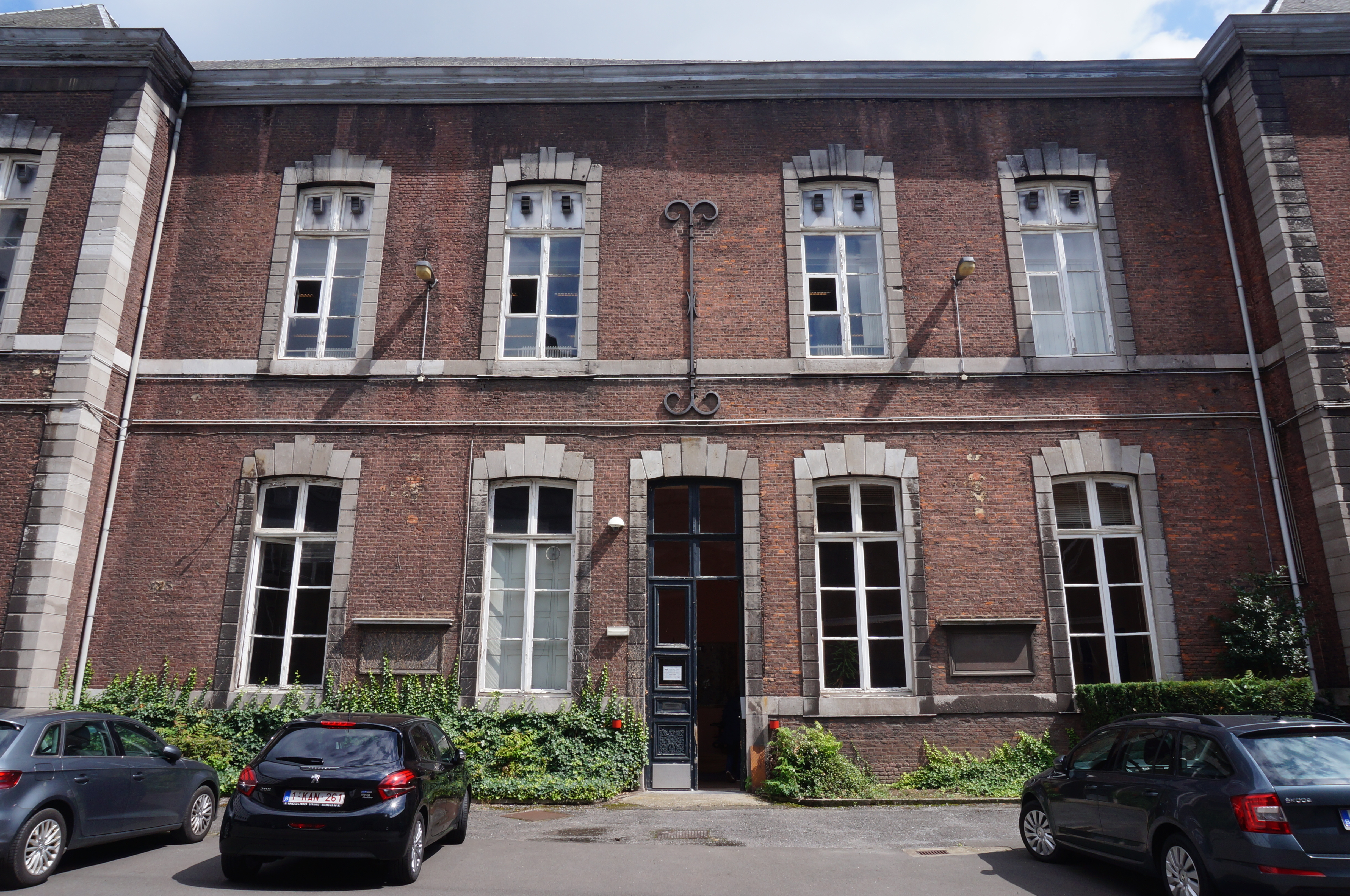 Façade de la Bibliothèque principale des Bibliothèques de l'université de Liège (XVIIe-XIXe) This is a file created at the museum: Library of Université de Liège